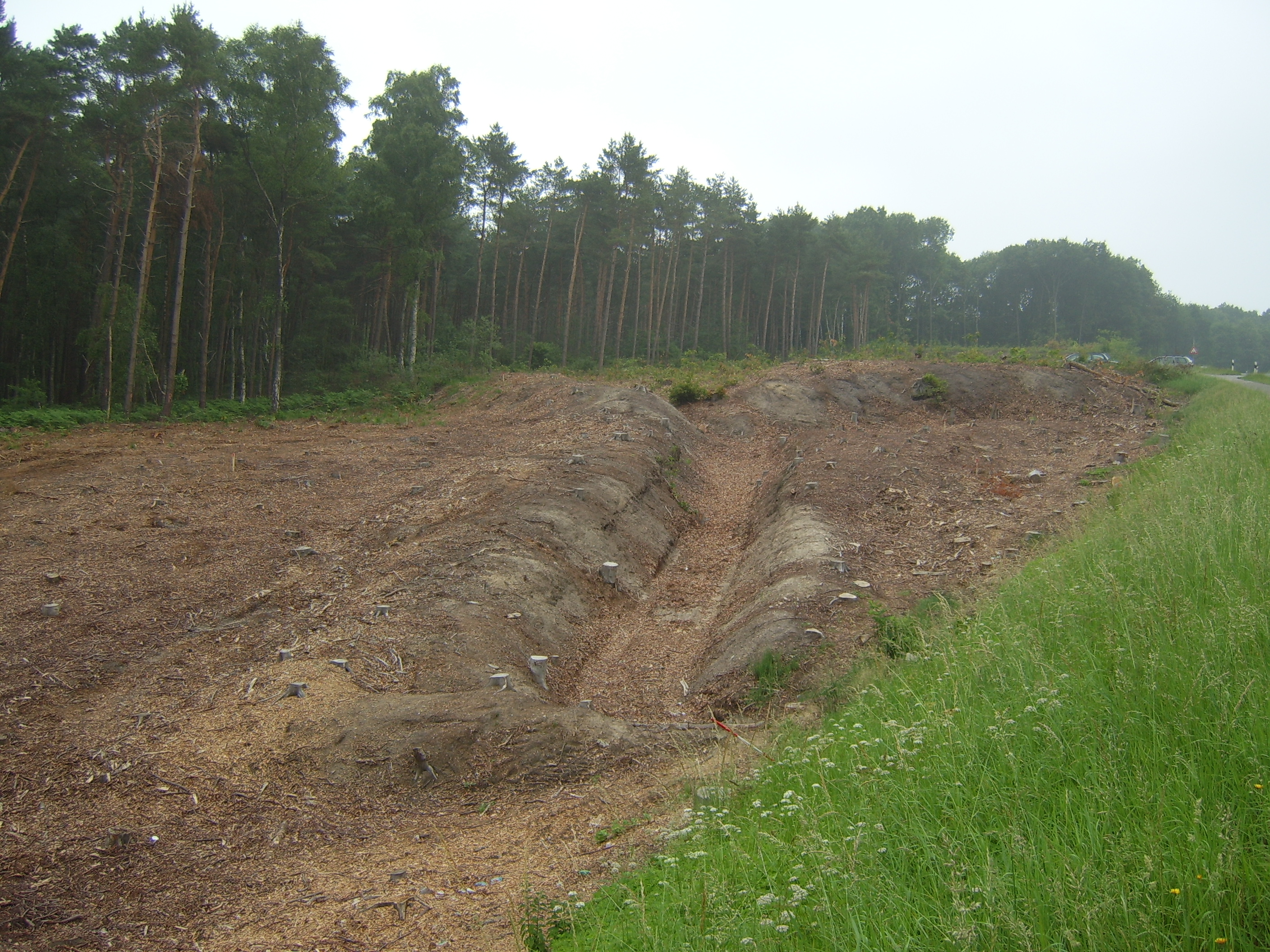 Panzergraben des Westwalls bei Elmpt